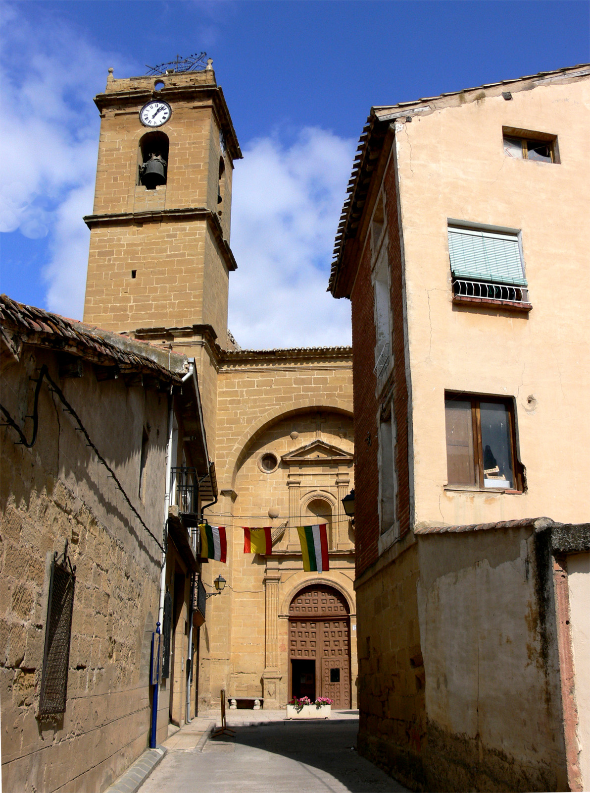 Iglesia de San Martín en Casalarreina, La Rioja - España.